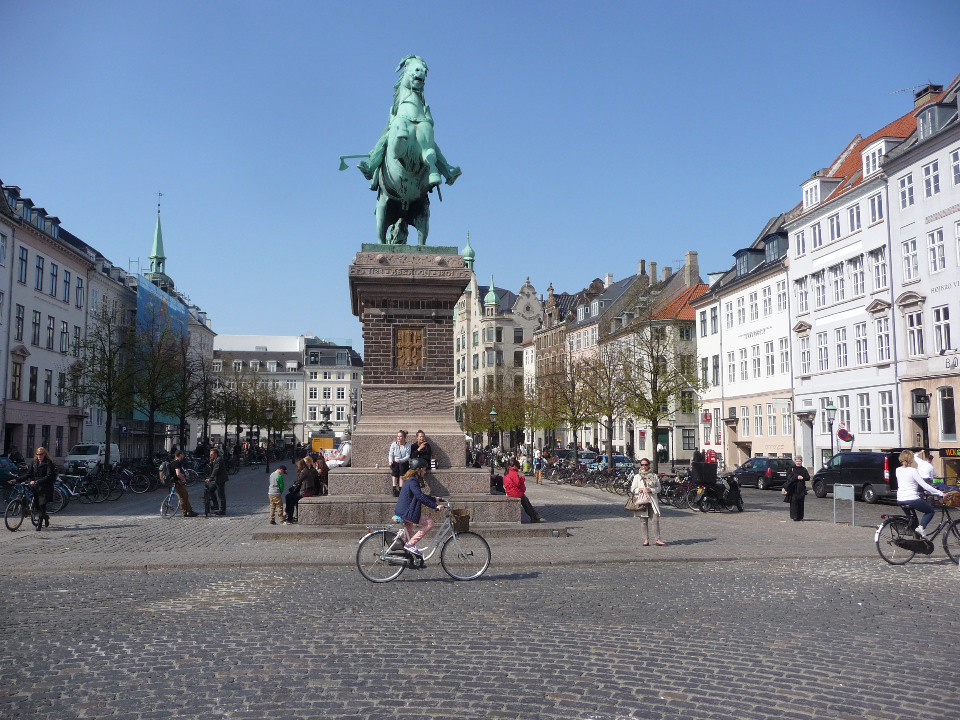 Højbro Plads in Copenhagen, Denmark